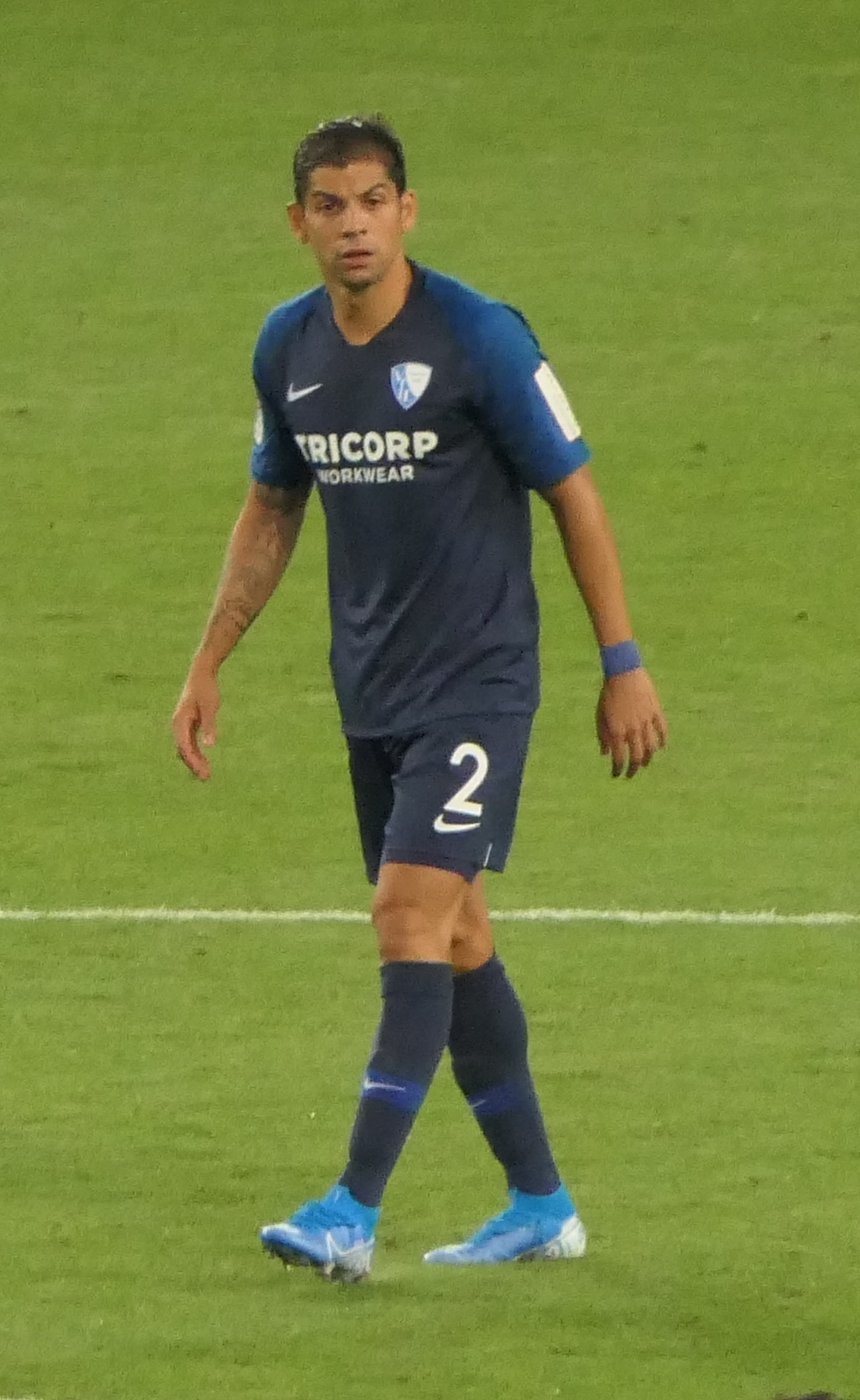 Der Fussballprofi Cristian Gamboa im Trikot vom VfL Bochum beim Auswärtsspiel gegen den VfB Stuttgart am 02.09.2019.